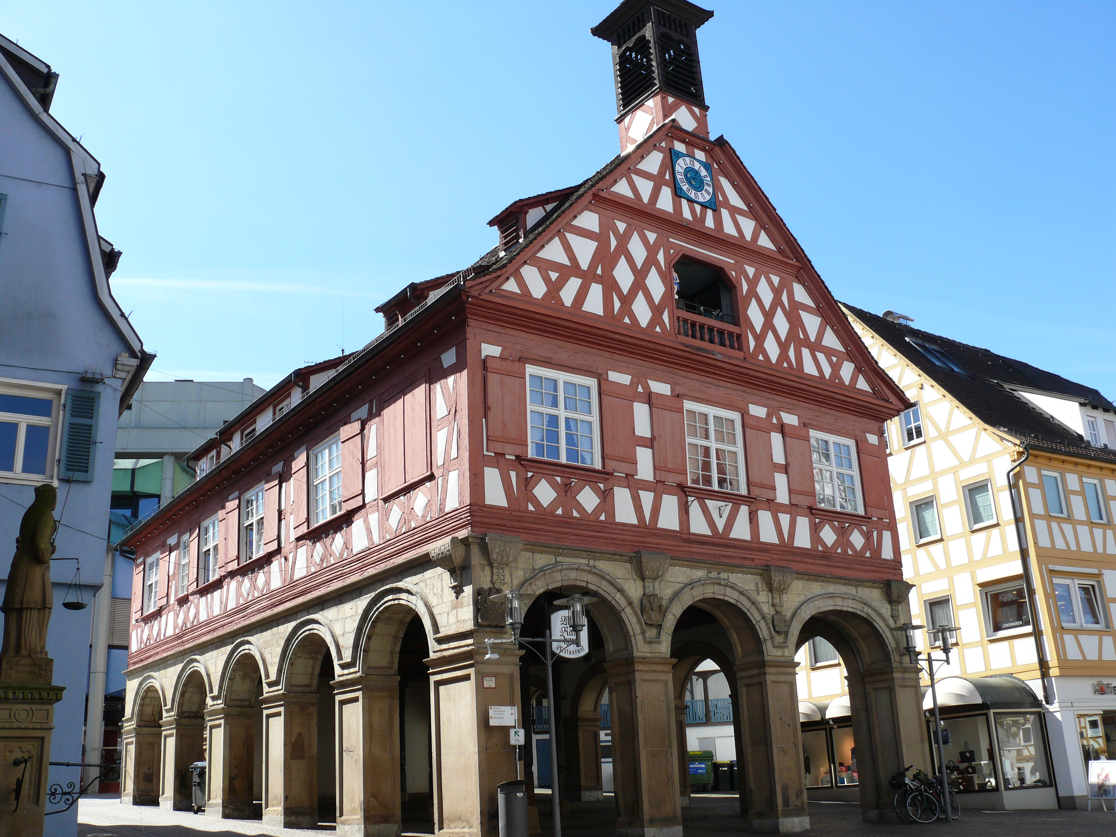 Das Alte Rathaus auf dem Marktplatz in Waiblingen. Blick von Osten.